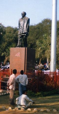 P. Sundarayya statue in Hyderabad